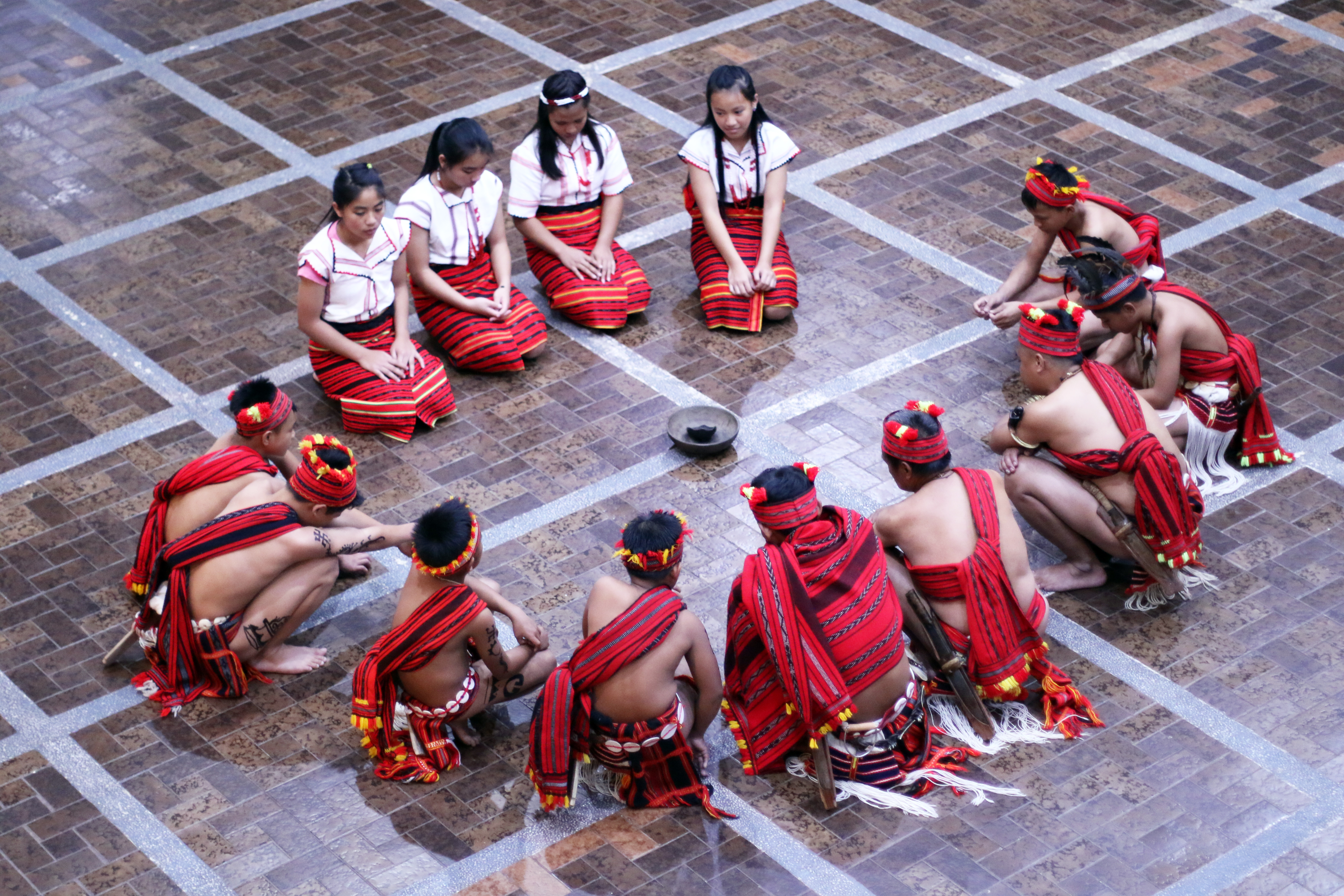 danse des Ifugao